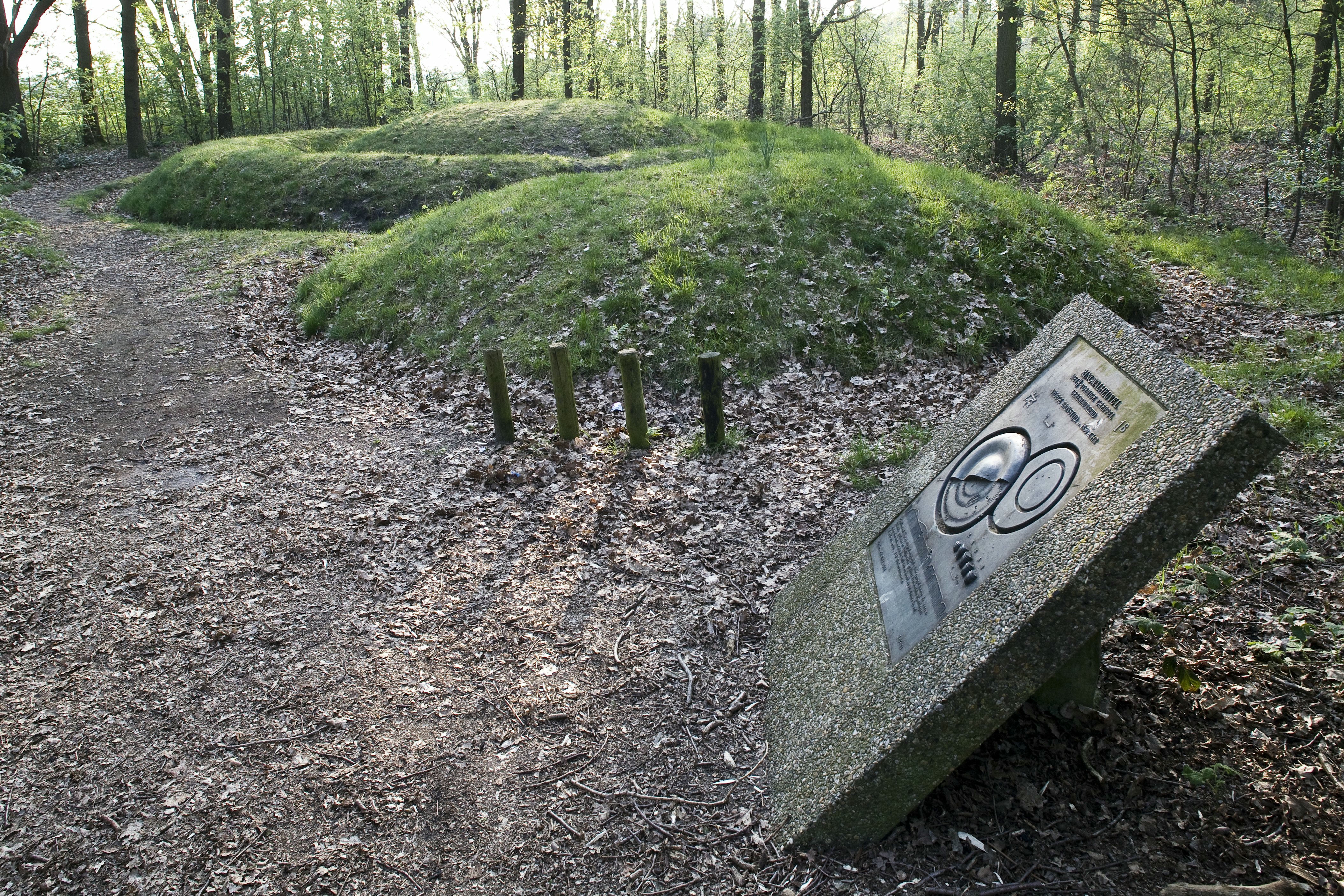 Ringwalheuvel: Overzicht op gerestaureerde grafheuvel, nr. 1B, bij Toterfout, uit de Midden-Bronstijd, omgeven door een achtvormige greppel met op de voorgrond een informatiepaneel (opmerking: Publicatie: De Acht Zaligheden (oude benaming) Archeologische Routes in Nederland)